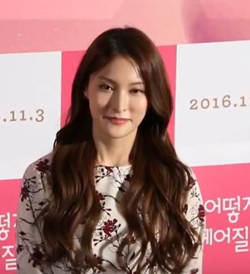 [TV10] 10월 24일 영화 '어떻게 헤어질까' 언론시사회 현장